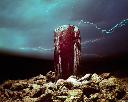 Jan Pohribný, fotografické dílo